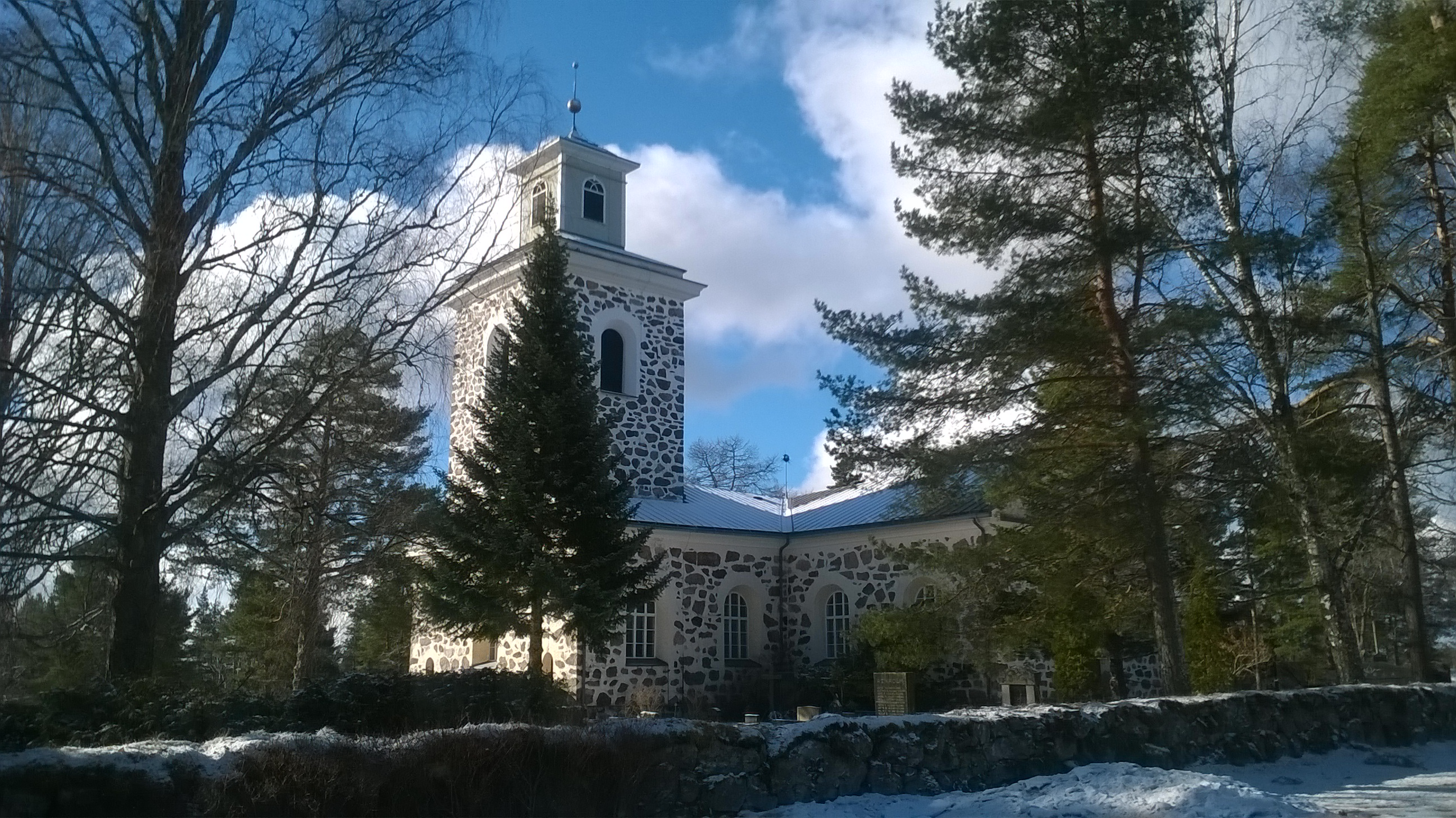 Nummen kirkko; kirkkorakennus Lohjan Nummella